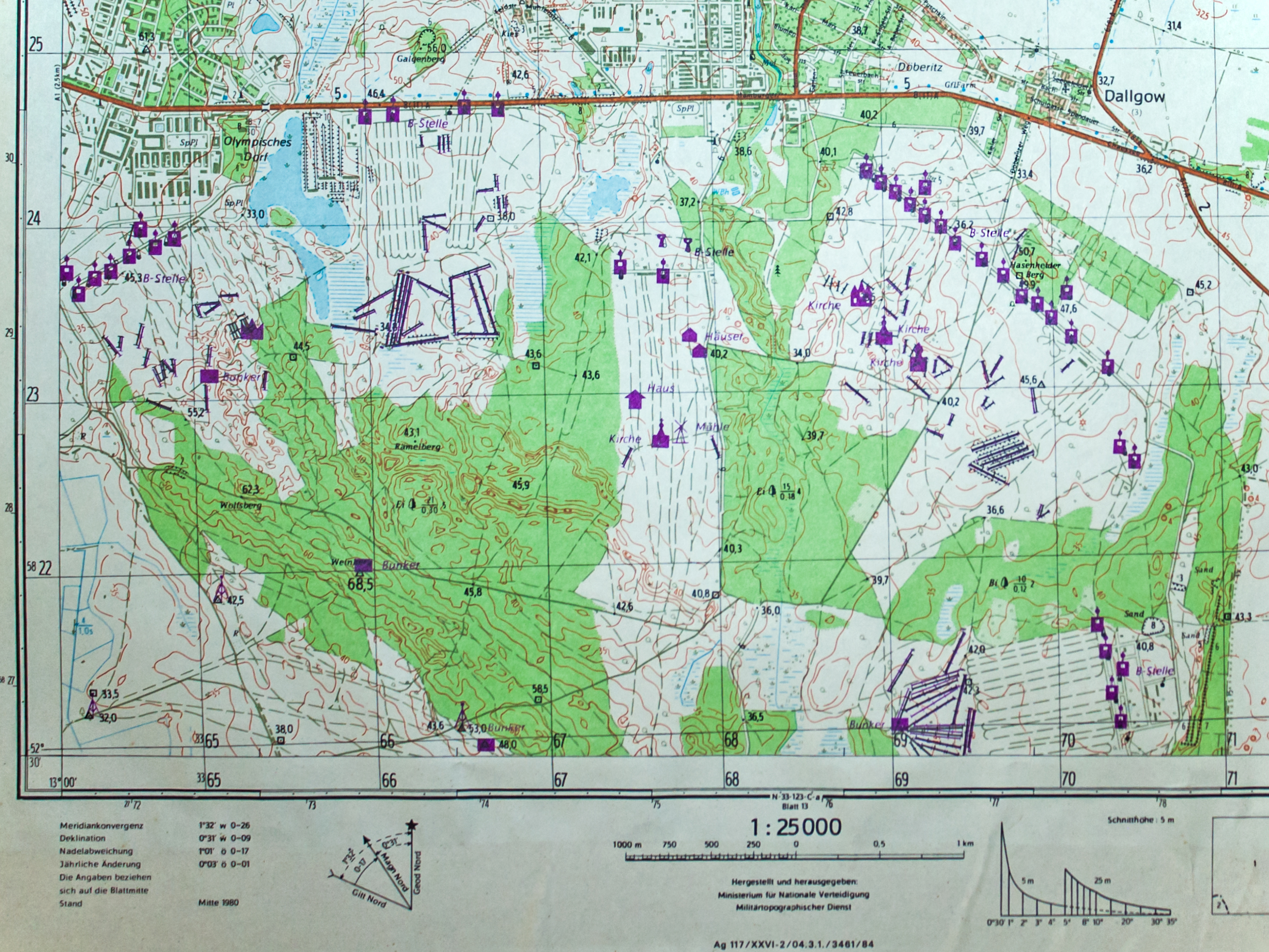 Militärtopographische Karte DDR mit Stand Mitte 1980, zur Zeit der Nutzung durch die "Rote Armee" mit Bunkern und Stellungen.